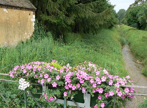 vue du fossé ,rû des Bergeries aux Sièges 89